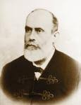 František Štěpka (1835-1896), rakouský politik